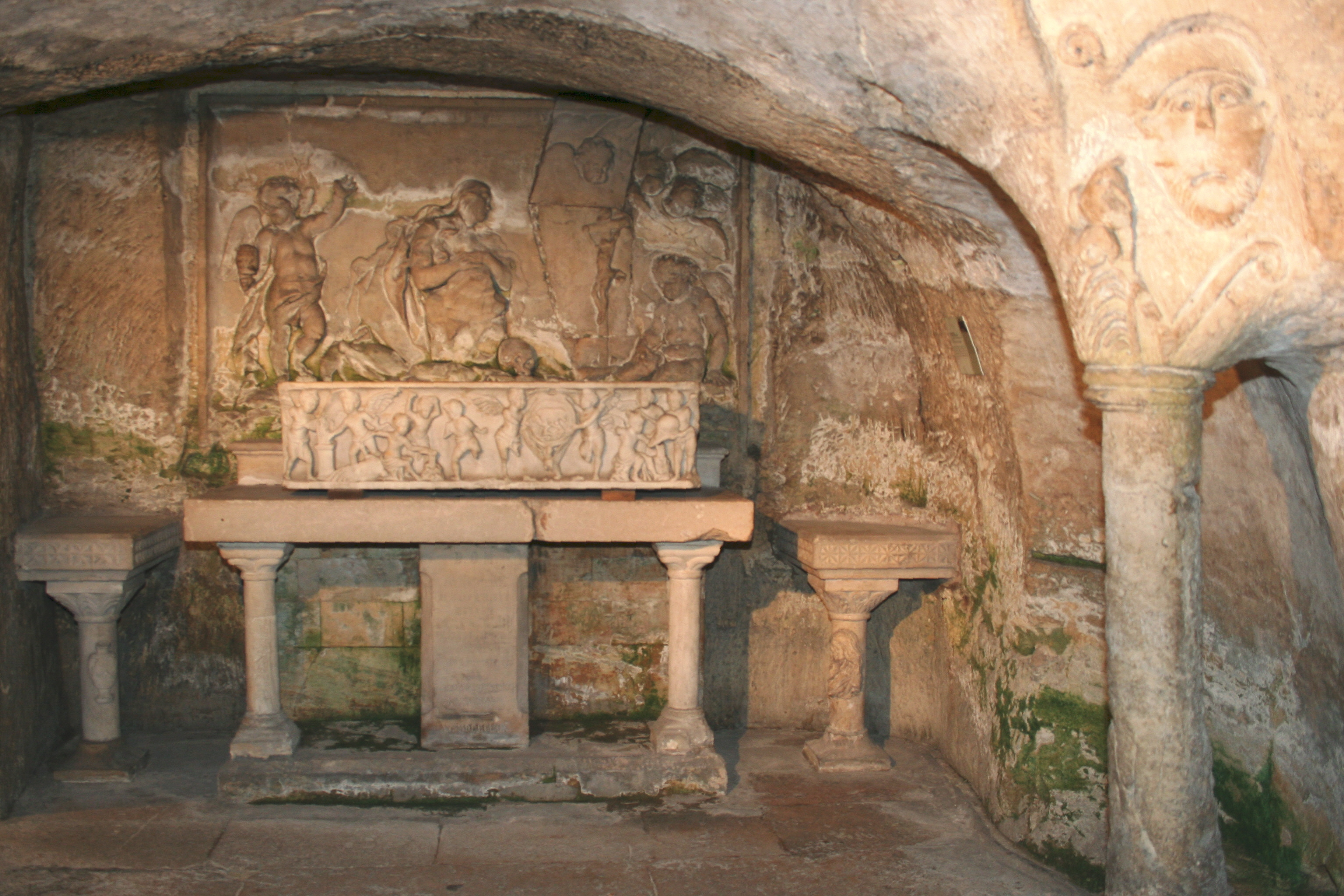 Chapelle Saint Lazare dans les cryptes de l'abbaye de Saint Victor.